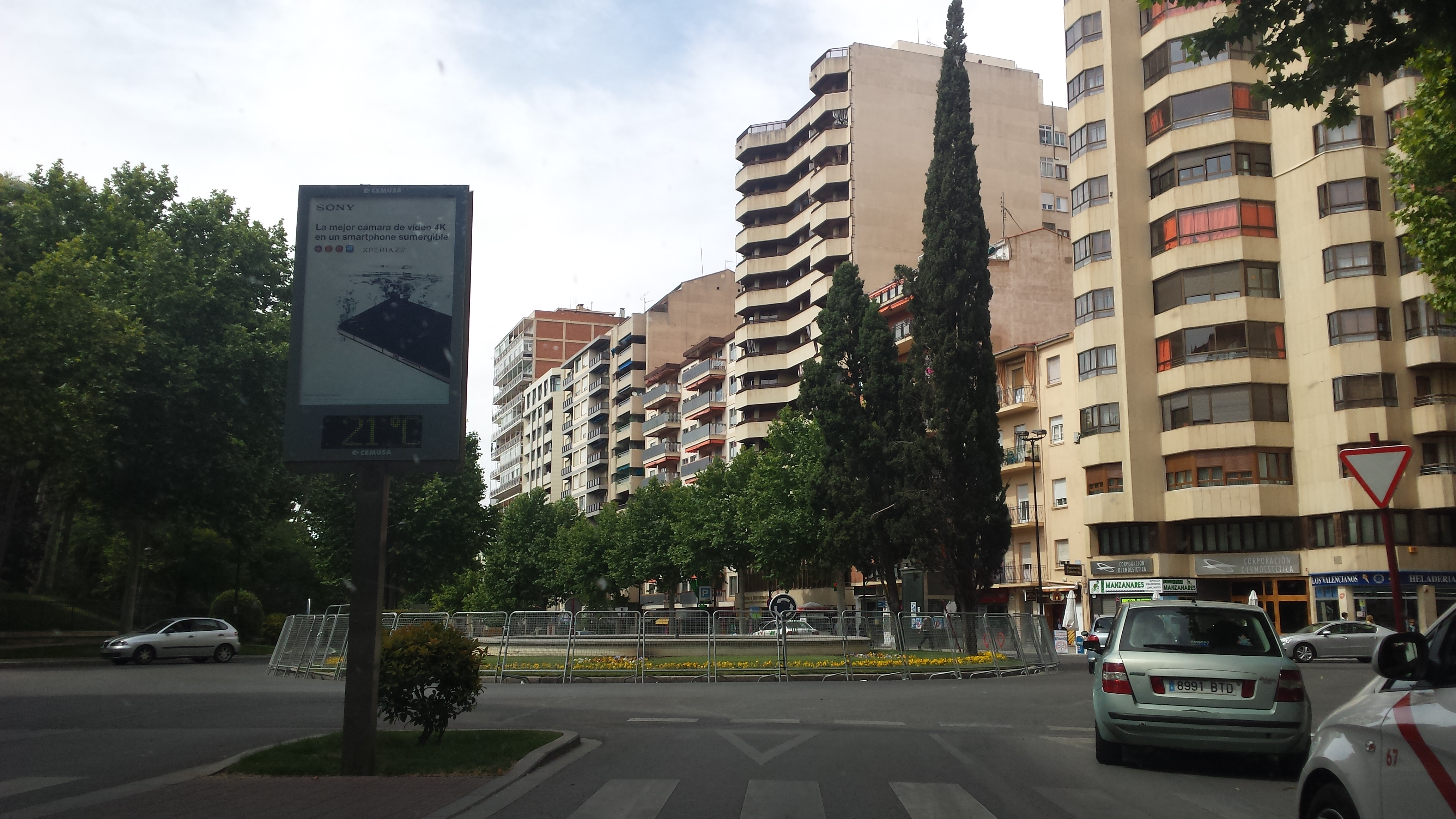 Plaza Benjamín Palencia. Avenida de España. Albacete